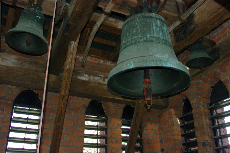 Dzwony na wieży kościoła św. Jakuba w Sandomierzu. Od lewej - Piotr, Jan, dzwon maryjny